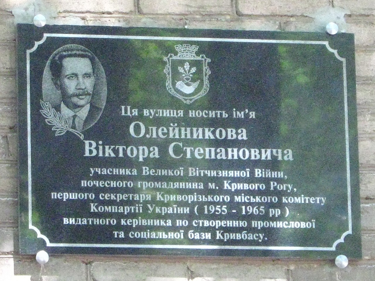 Дендрологічний парк, м. Кривий Ріг, Дзержинське лісництво, кв.52